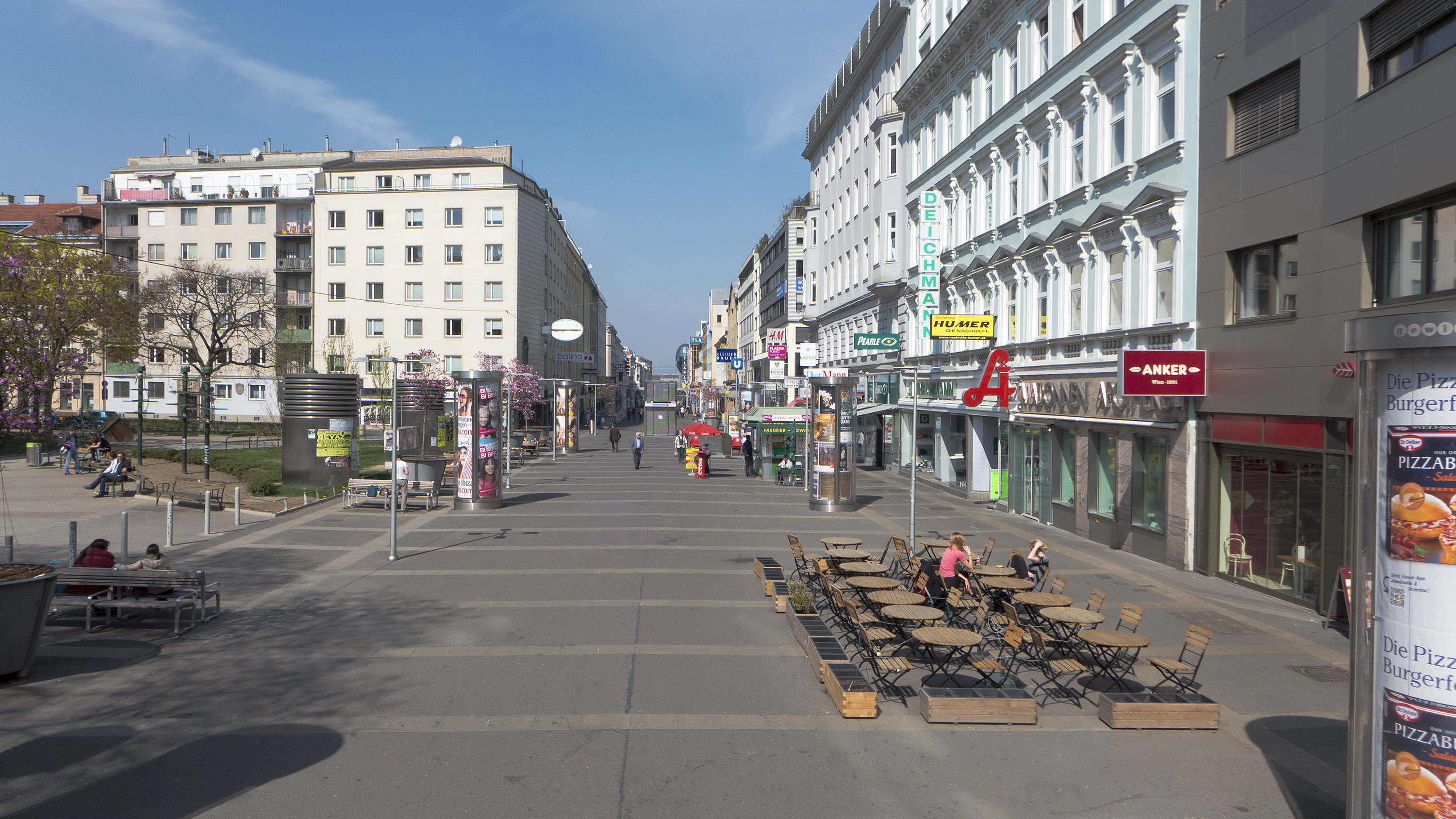 Favoritenstraße in Wien 10 beim Keplerplatz Nr. 13 Richtung Norden